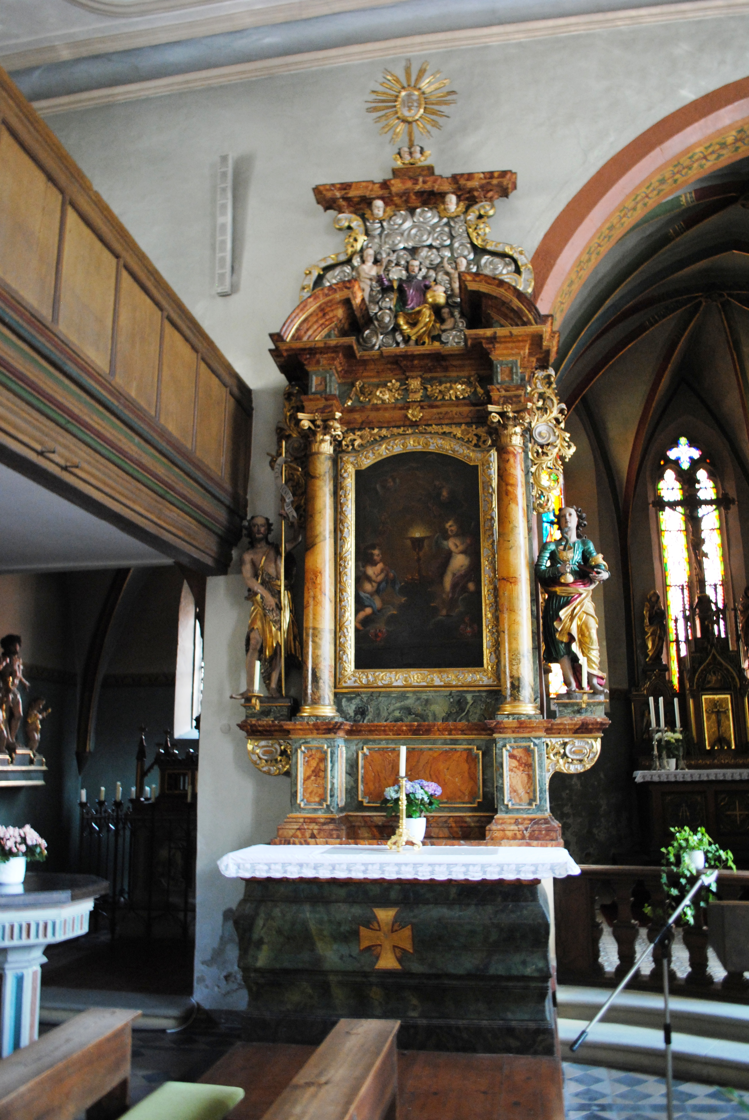 Linker Seitenaltar, Heilig Blut